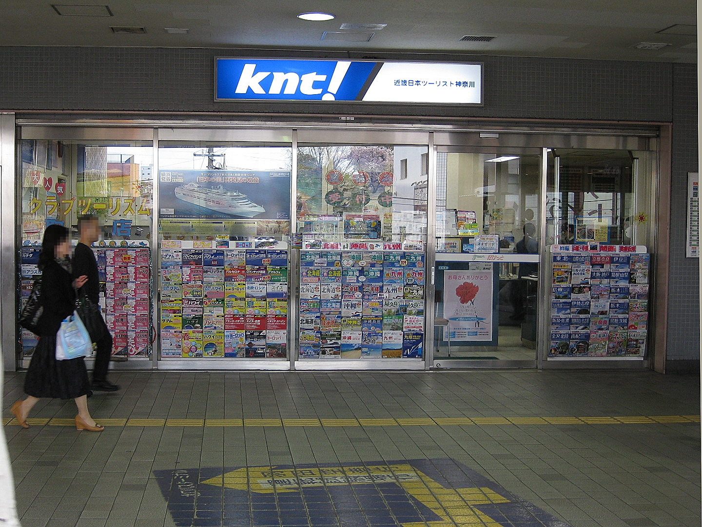 近畿日本ツーリスト神奈川 二俣川駅旅行センター （旭区二俣川2-91-7、二俣川駅グリーンぽけっと内）